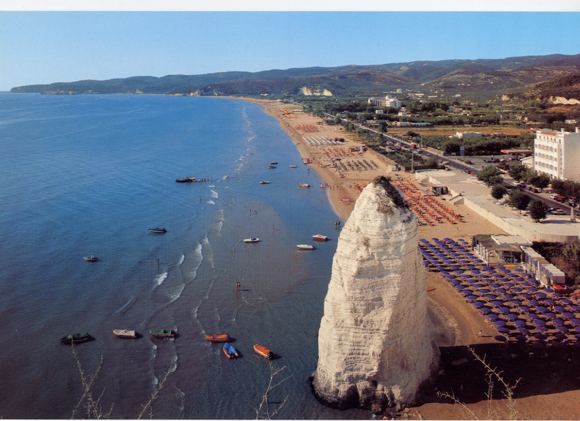 Vieste, Puglia, Italia